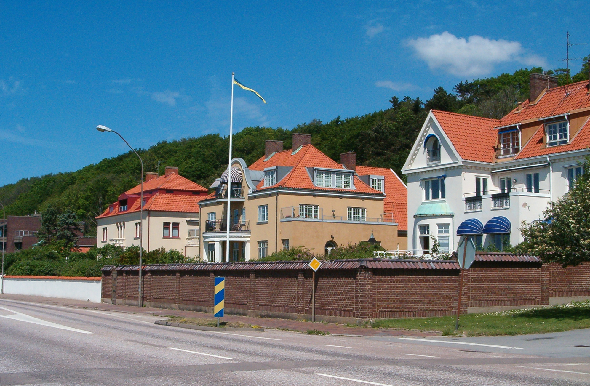 Villas along Drottninggatan in Helsingborg, Sweden